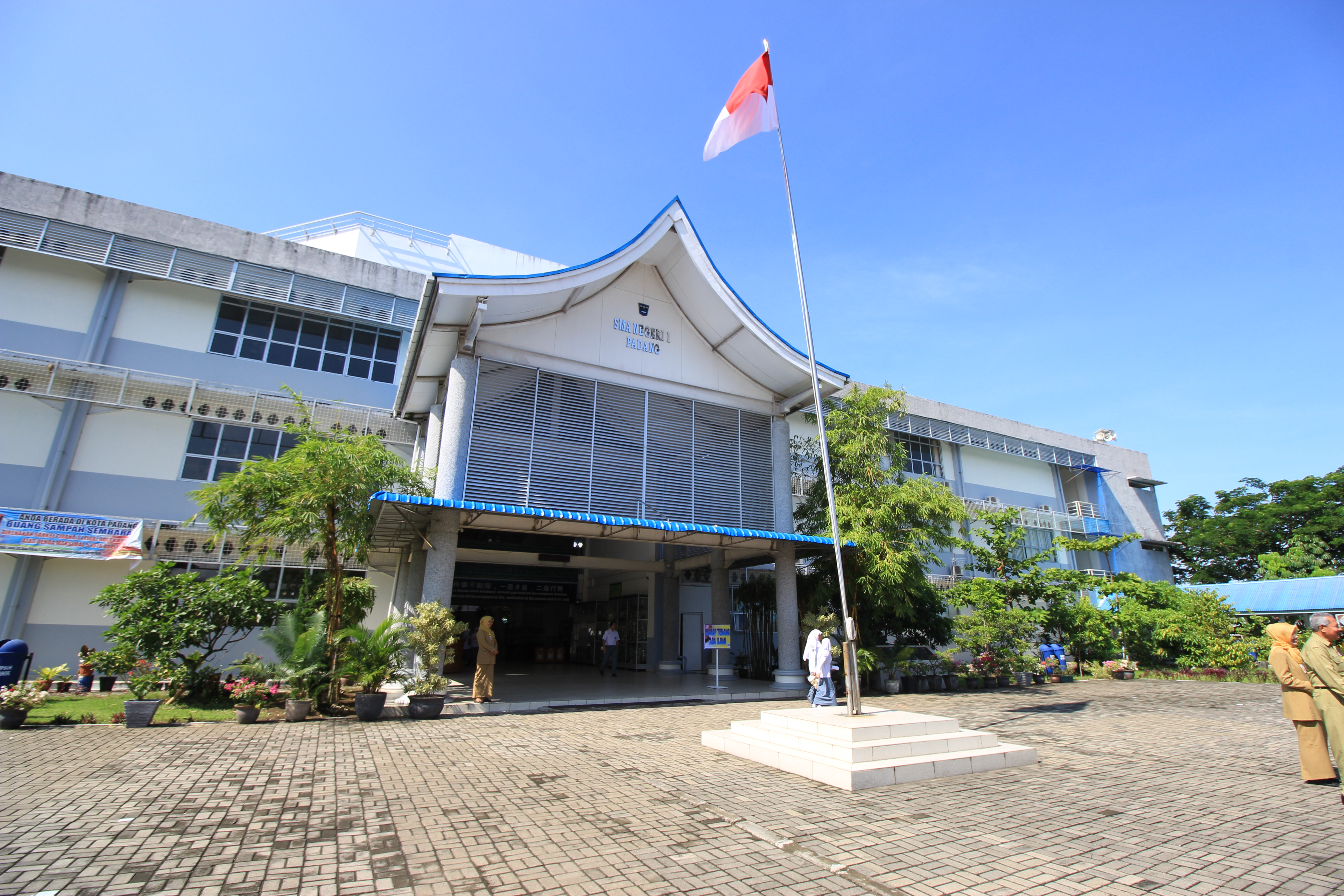 SMA Negeri 1 Padang